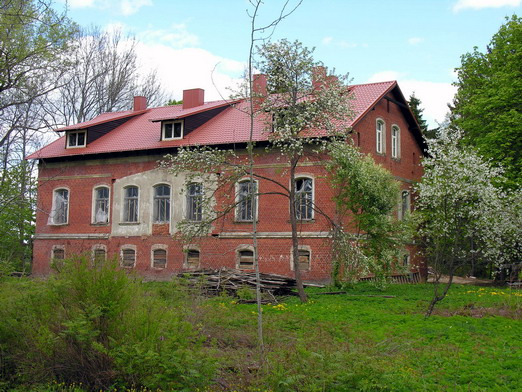 Dautarai, Mažeikių raj., Židikų seniūnija. Atstatomas dvaras. Foto: Algirdas, 2006 m. gegužės 17 d.